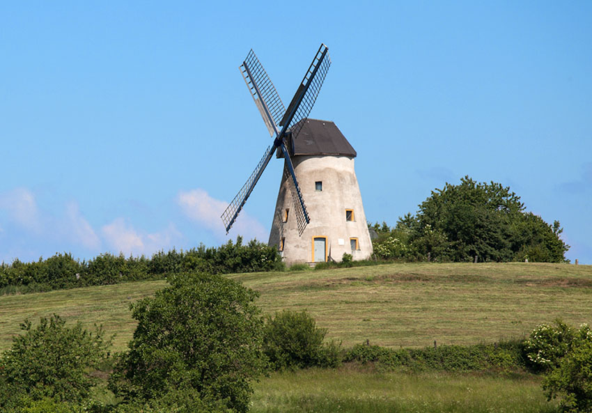 Windmühle Bavenhausen This is a photograph of an architectural monument.